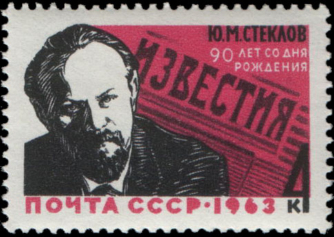 Почтовая марка СССР - Стеклов Юрий Михайлович, российский революционер